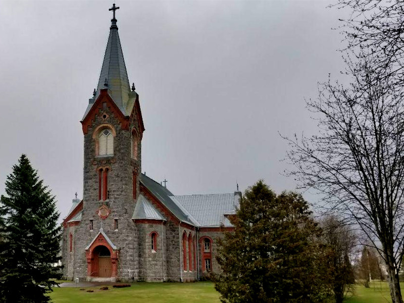 Церковь в Китеэ